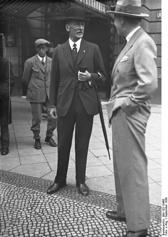 Graf Ottokar Czernin der frühere oesterreichische Minister des Auswärtigen unter dem Kaiser Franz Joseph, weilt zu Besuch in Berlin! Graf Ottokar Czernin vor dem Hotel Adlon in Berlin im Gespräch mit seinem Sohn.